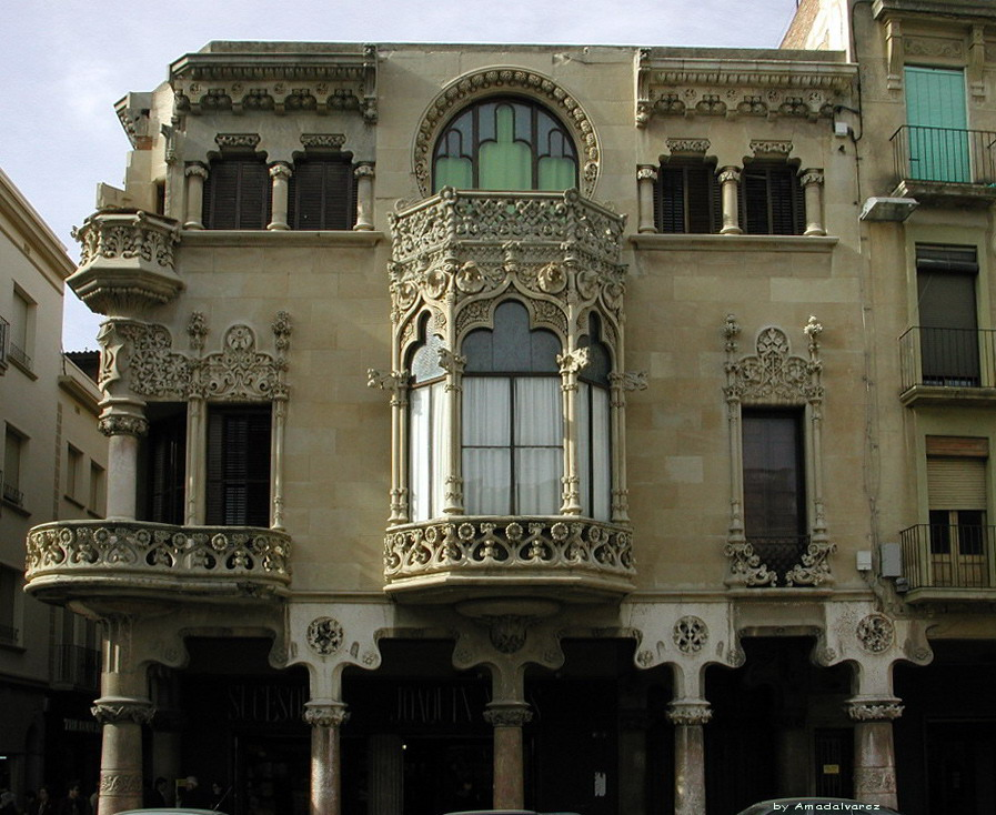 Casa Navàs, a Reus (Baix Camp), obra modernista de Lluís Domenech i Montaner entre 1902 i 1907